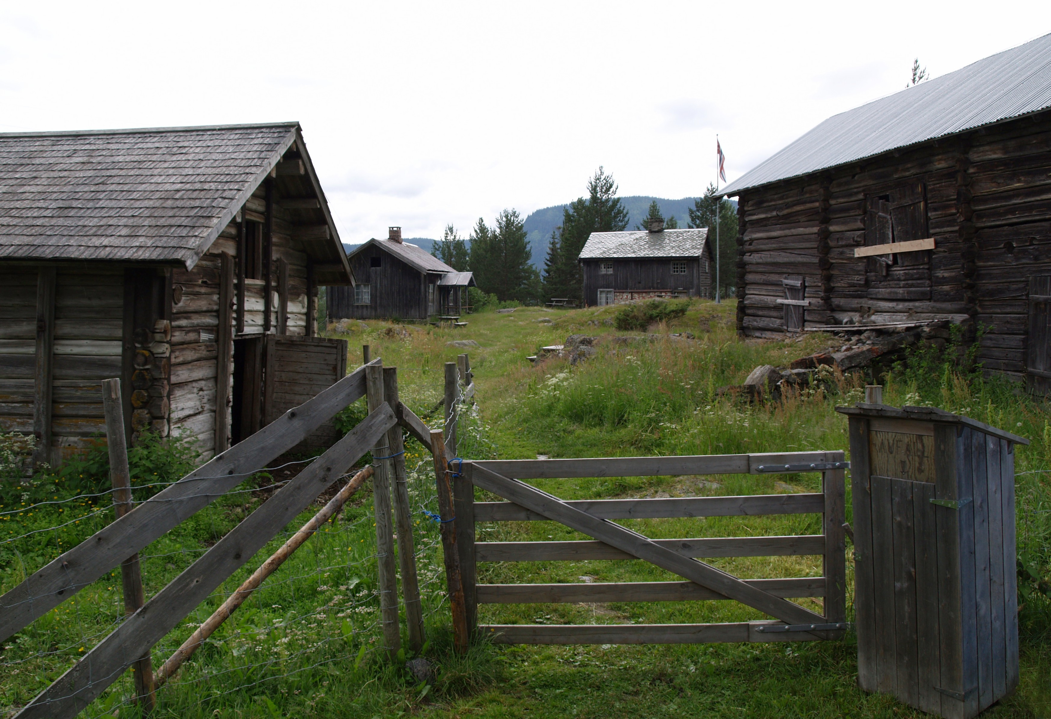 Looking through the gates at Bagnsbergatn gård, Sør-Aurdal. See Kampen om Bangsbergatn gård.